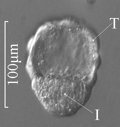 Mikrofotografia mysiej blastocysty. Mikroskop z kontrastową modulacją Huffmana. I - ICM (węzeł zarodkowy); T - Trofoblast